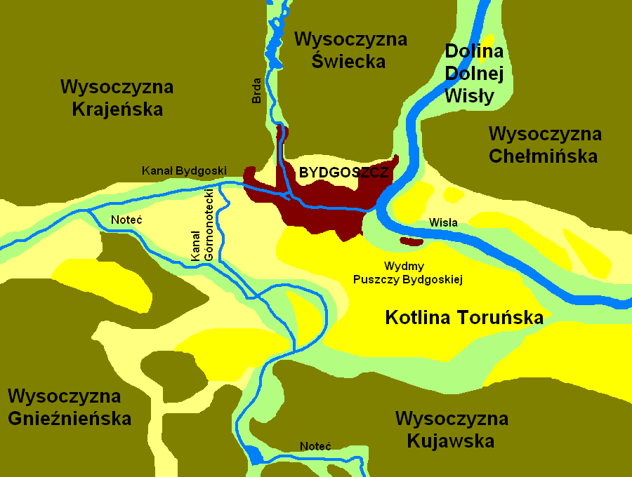 Położenie Bydgoszczy wśród krain geobotaniczno-krajobrazowych na podstawie "Krajobrazy Polski i ich pierwotne fragmenty", S. Jarosz, 1954"